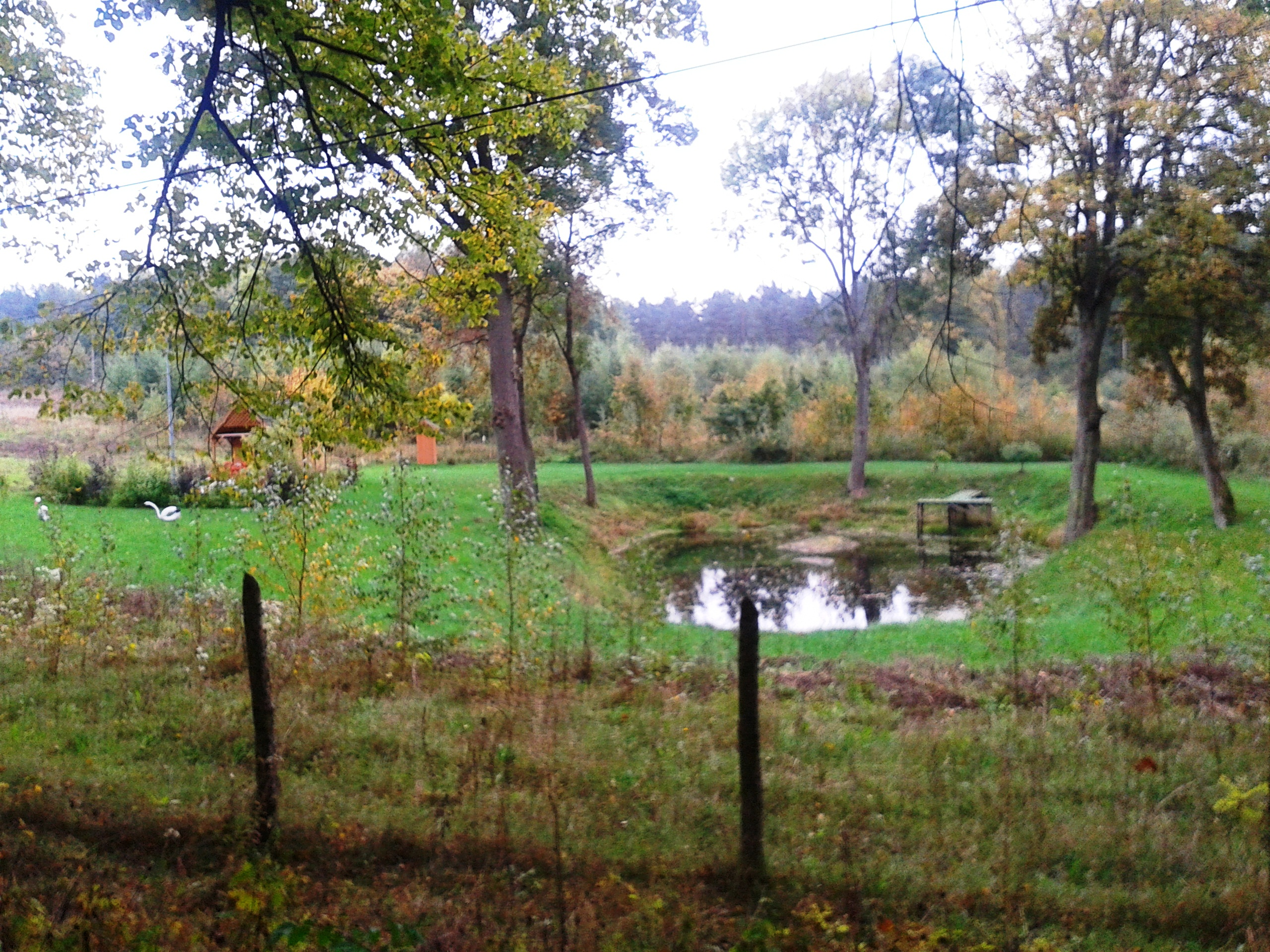 Łobżany 13